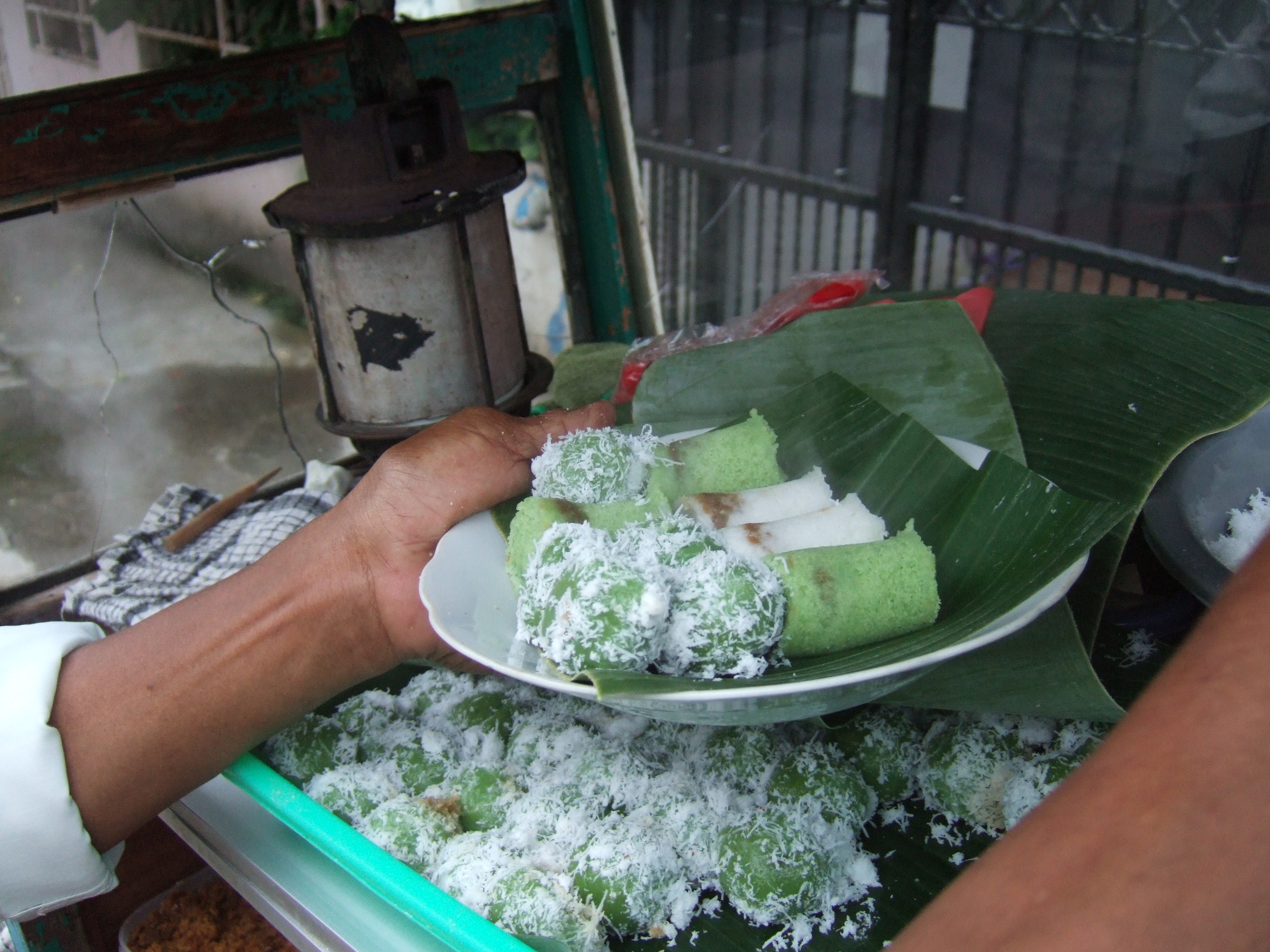 Kue putu keliling, Jakarta